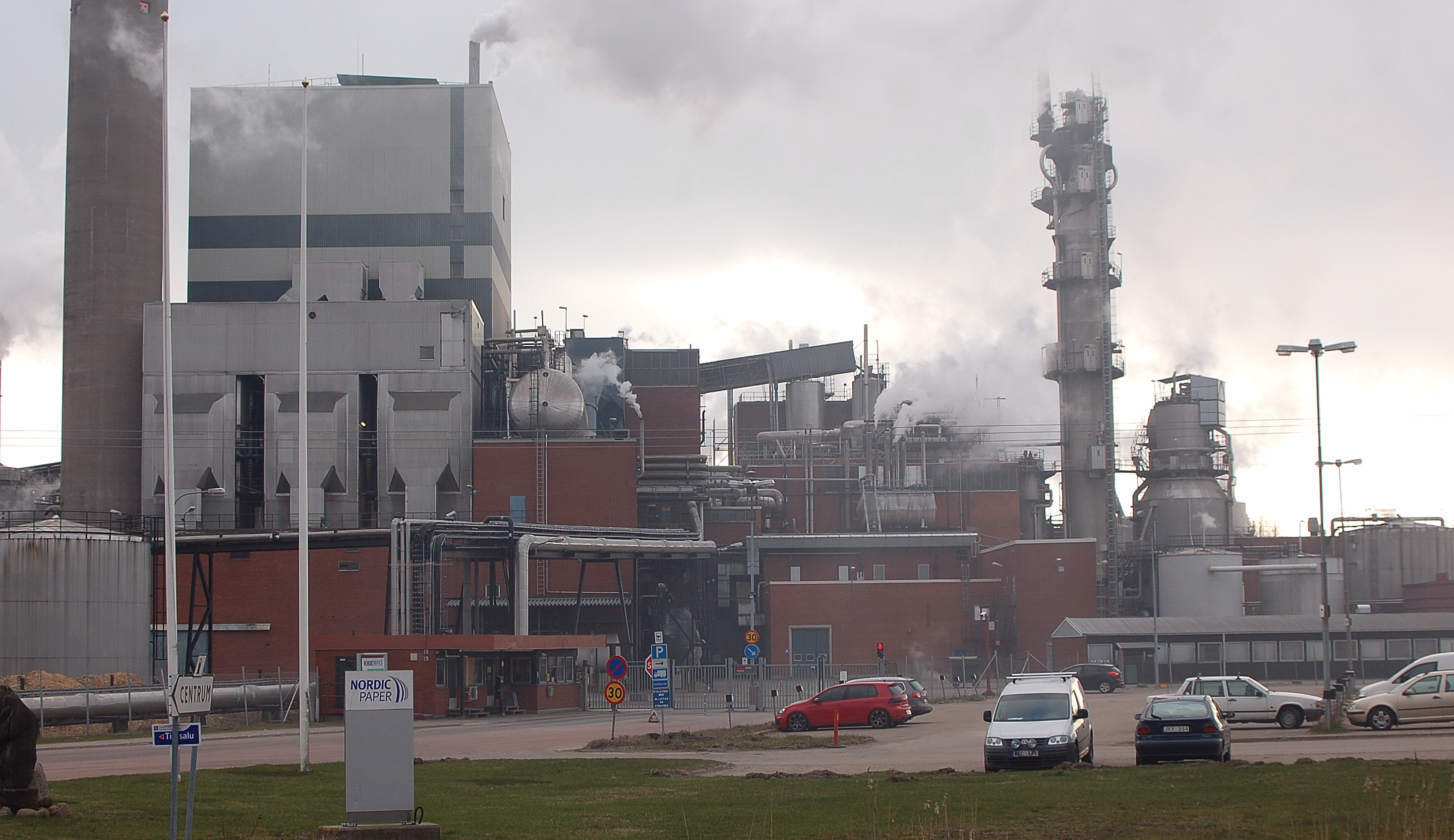 Bäckhammars Bruk i Bäckhammar, Kristinehamn.